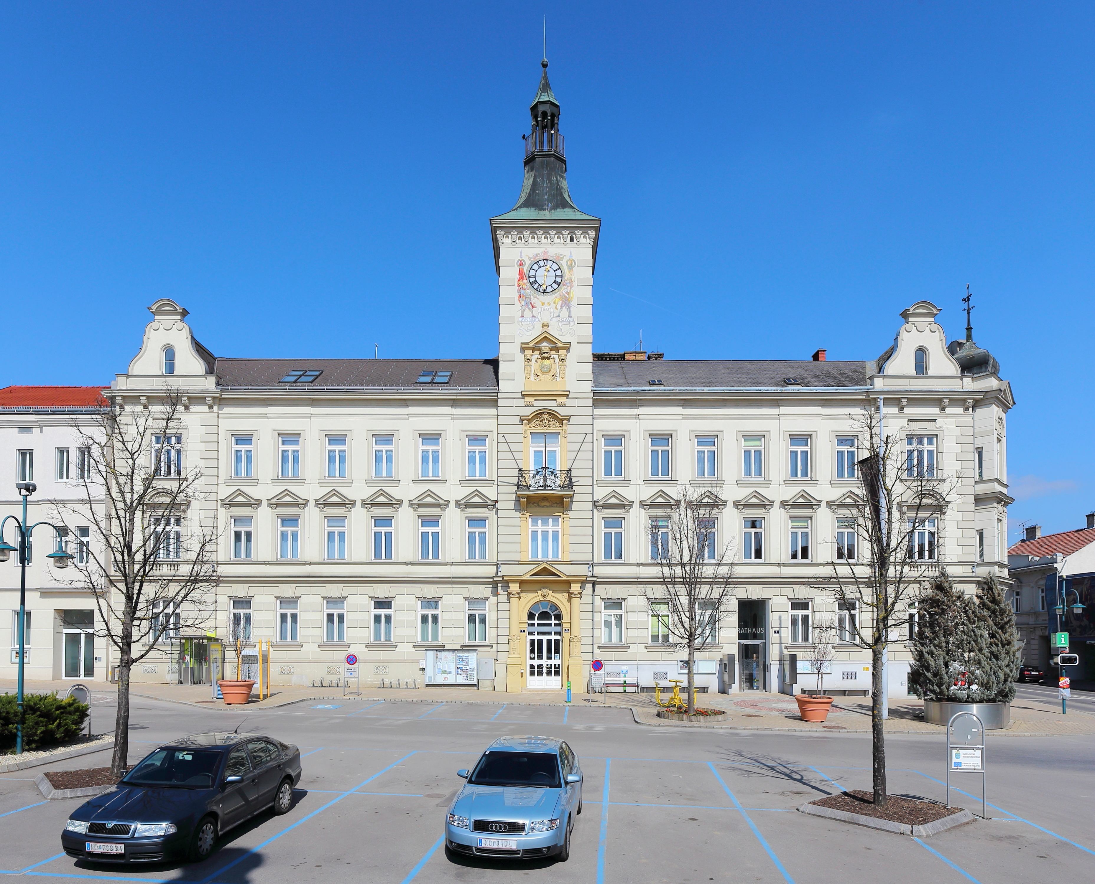 Südansicht des Rathauses in der niederösterreichischen Bezirkshaupstadt Mistelbach.Ein neobarocker dreigeschossiger Baukomplex um zwei kleine Höfe, der nach Plänen von Eugen Sehnal und Josef Dunkel 1901 errichtet wurde. Die Hauptfassade ist Richtung Süden ausgerichtet und hat in der Mitte einen leicht vorgezogenen Uhrturm.